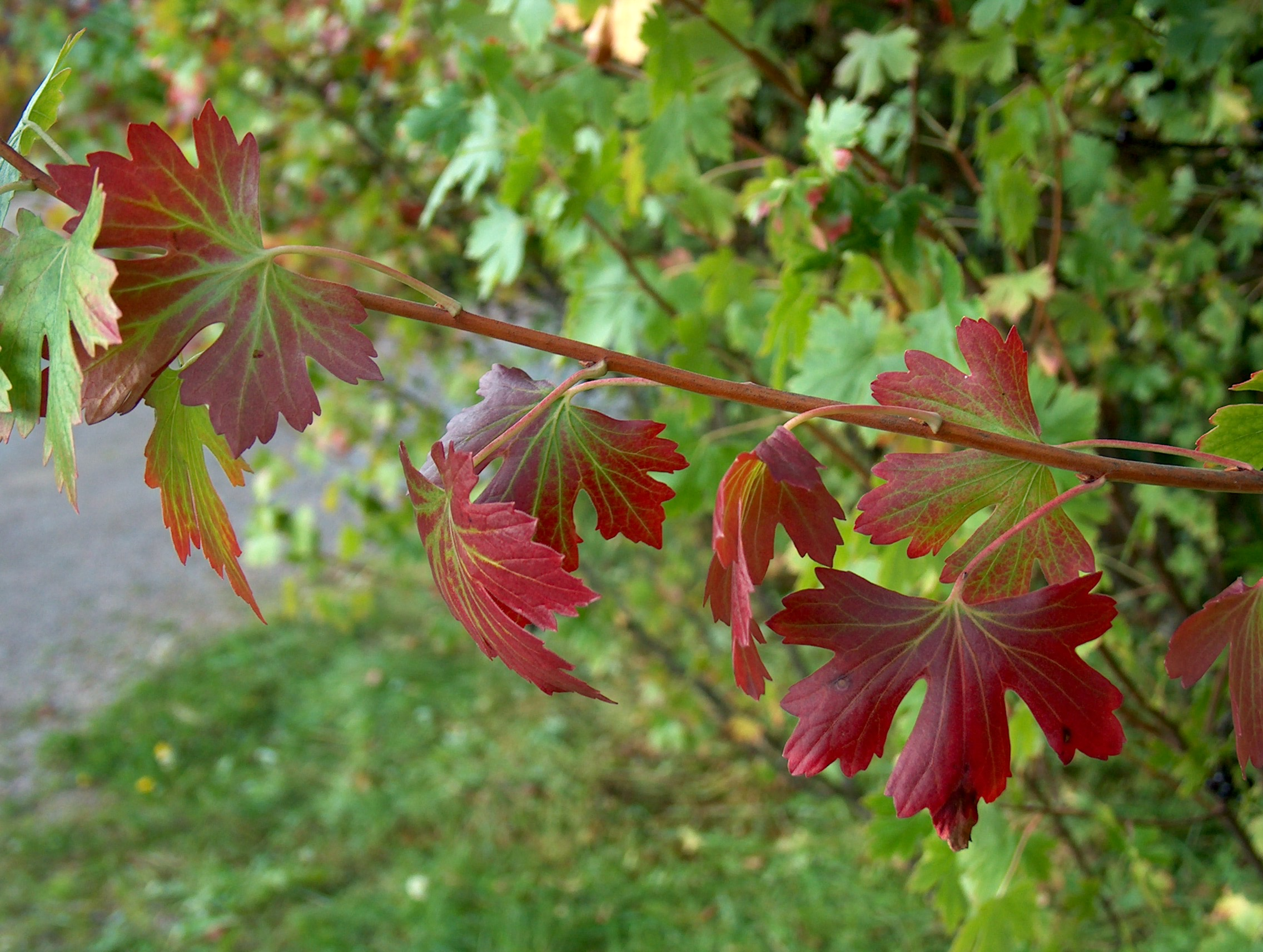 Ribes aureum leaves in autumn colours